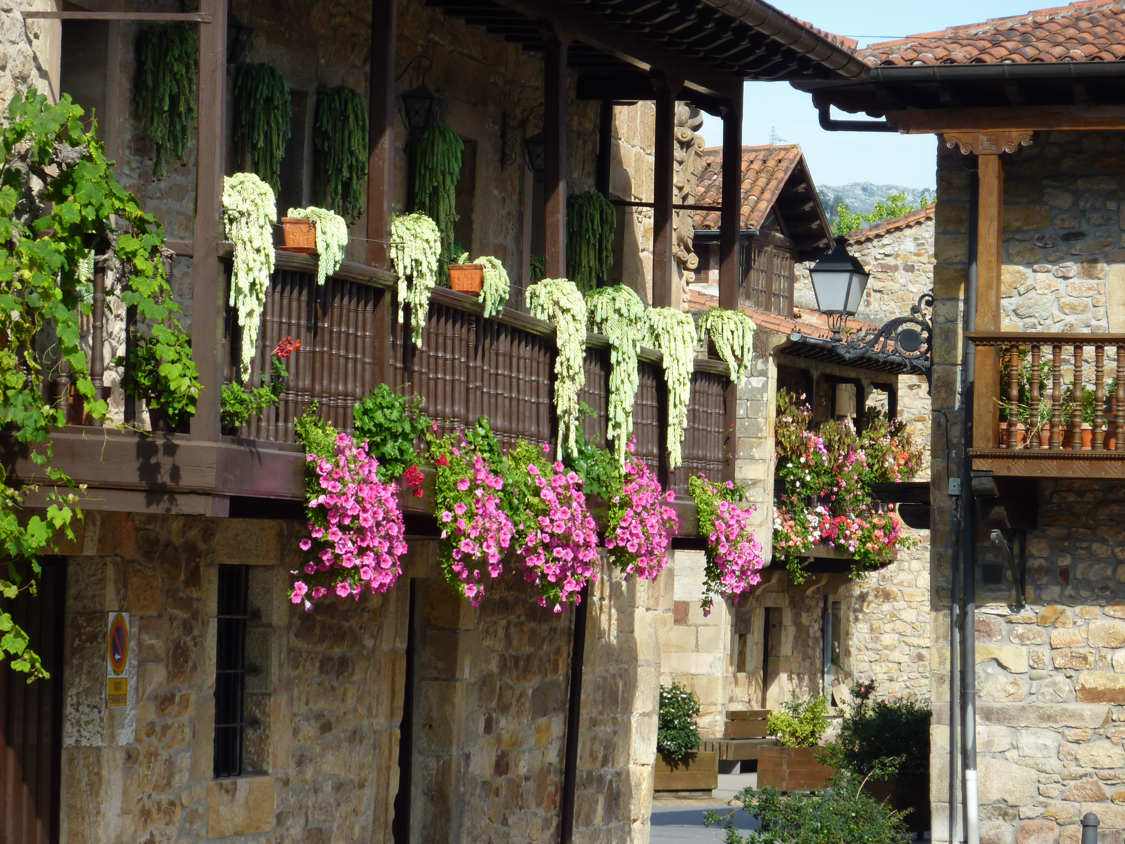 Casa tradicionales.